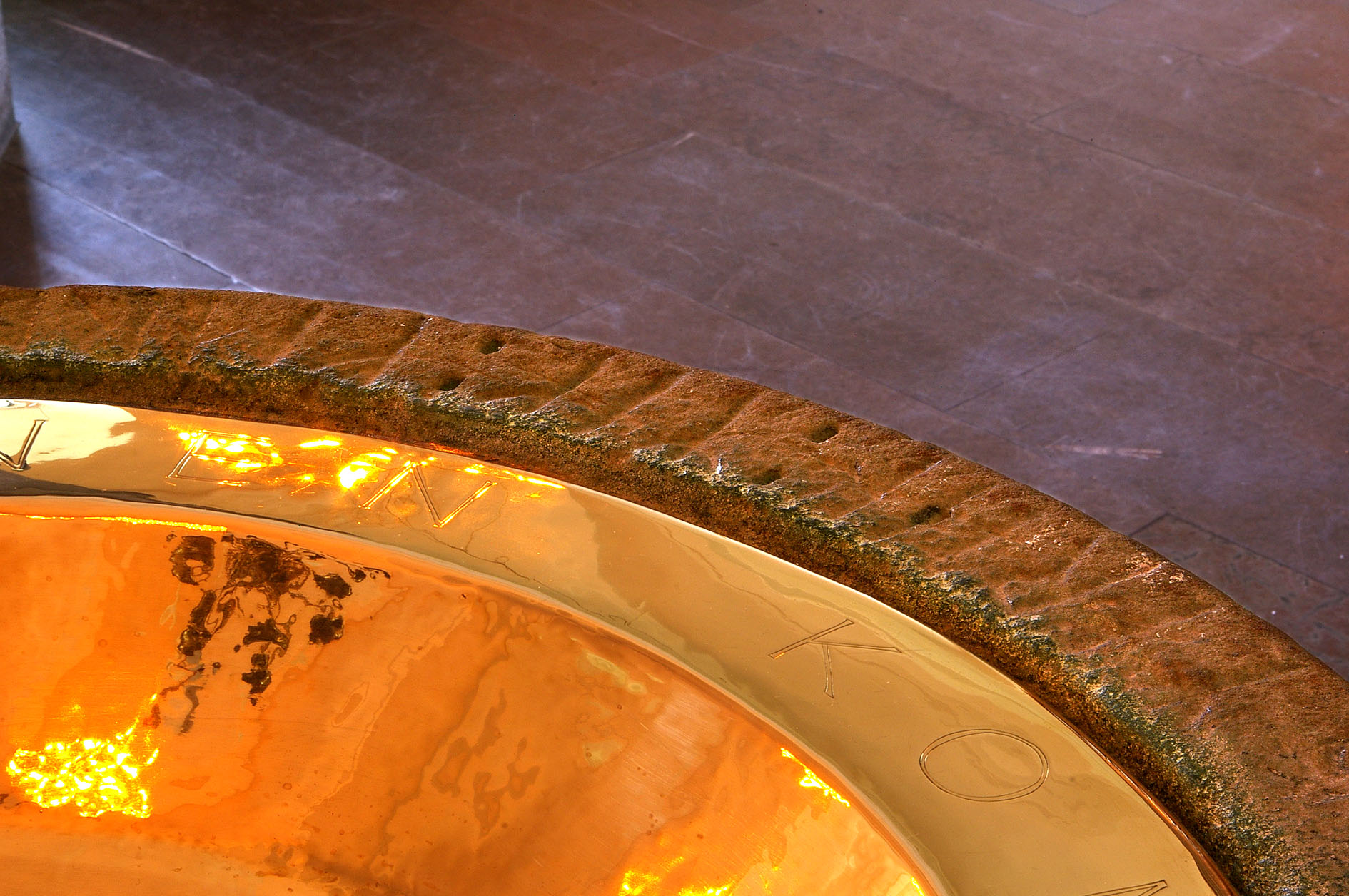 Runinskrift på dopfunten i Höörs kyrka, Skåne.